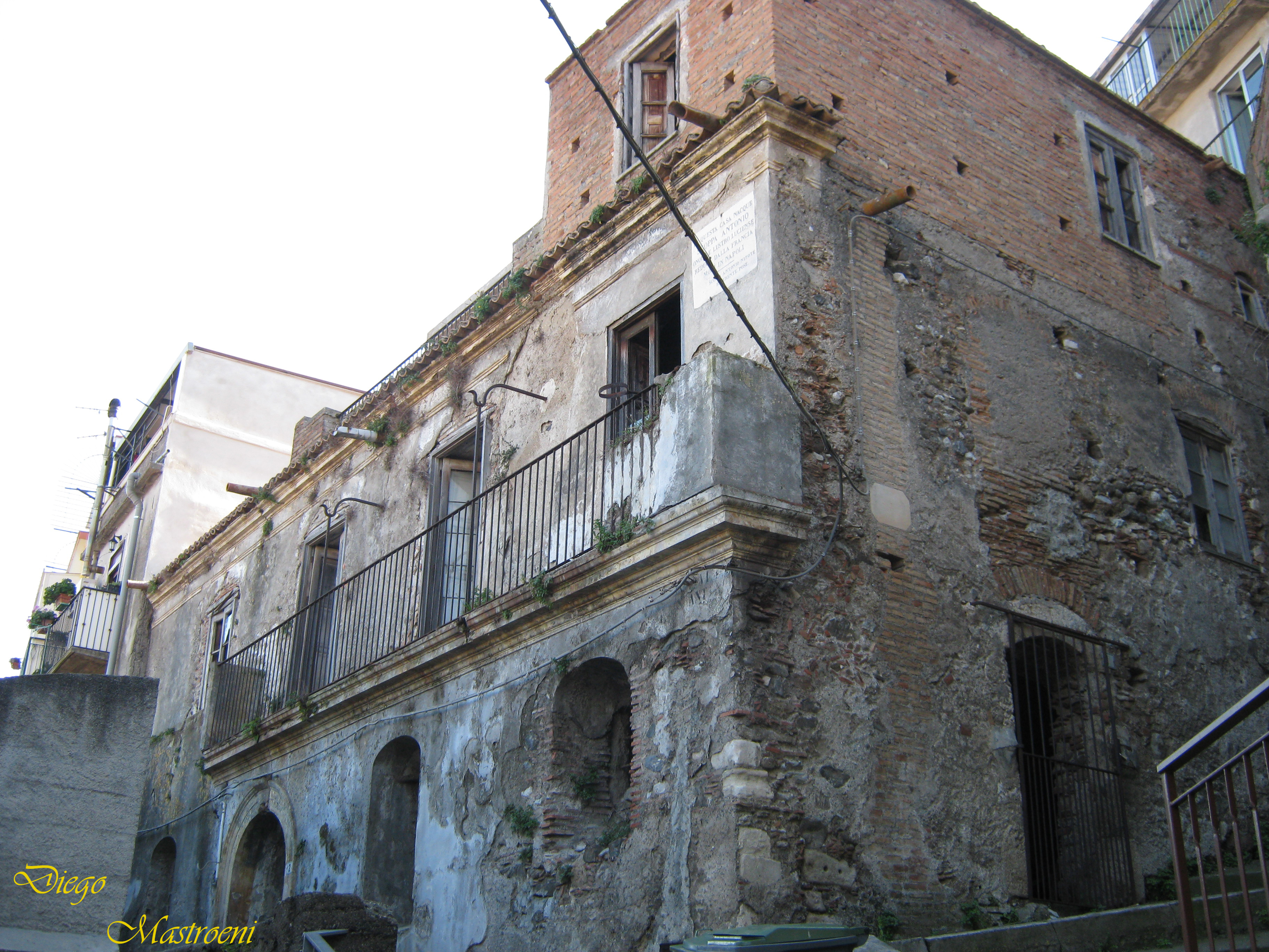 House of writer Antonio Scoppa (1763 – 1817), Santa Lucia del Mela